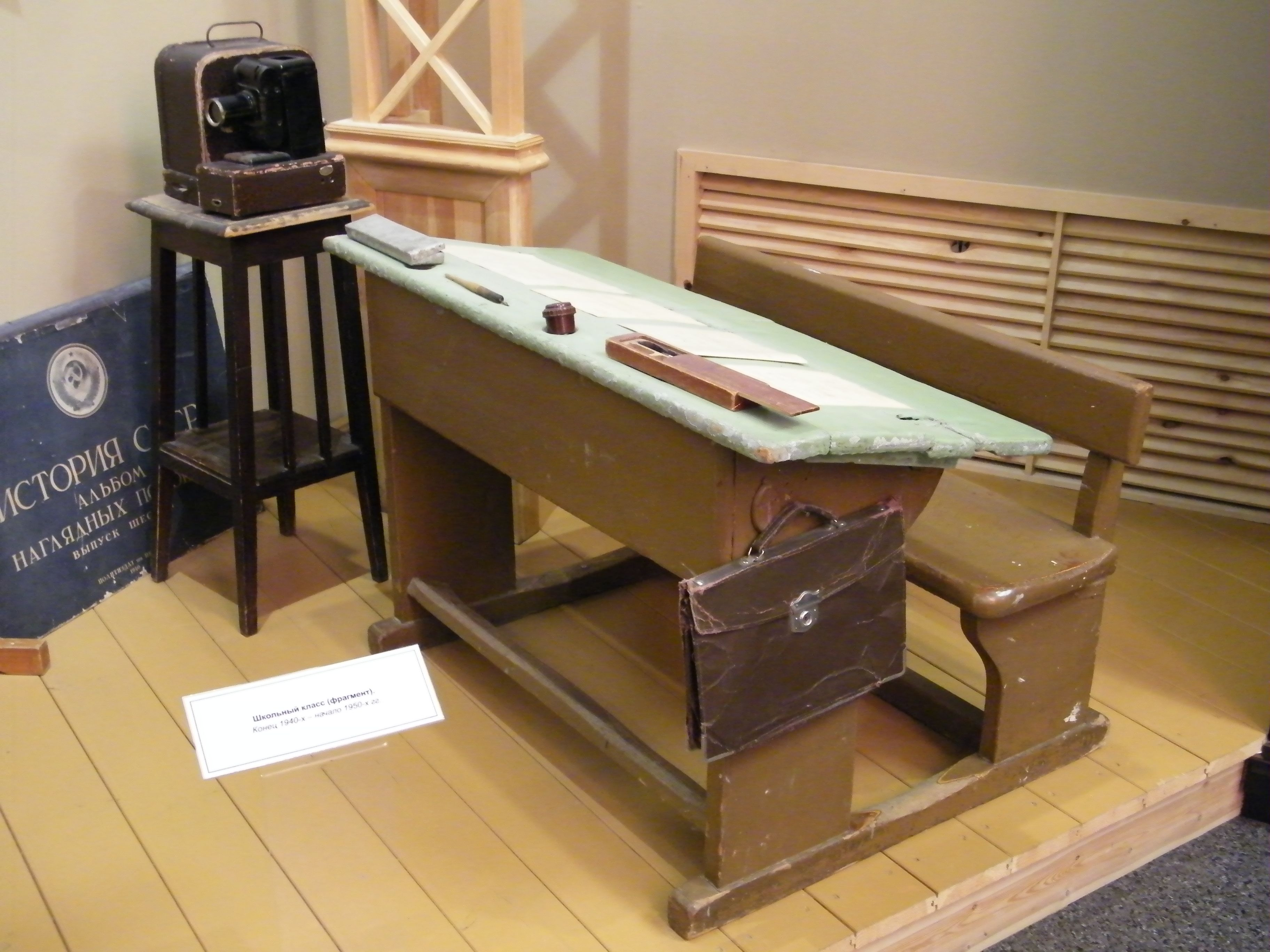 Школьный класс 40-х-50-х годов в Хабаровском краеведческом музее